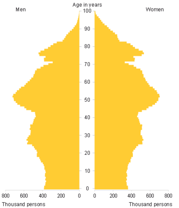 Половозрастная пирамида Германии 2015